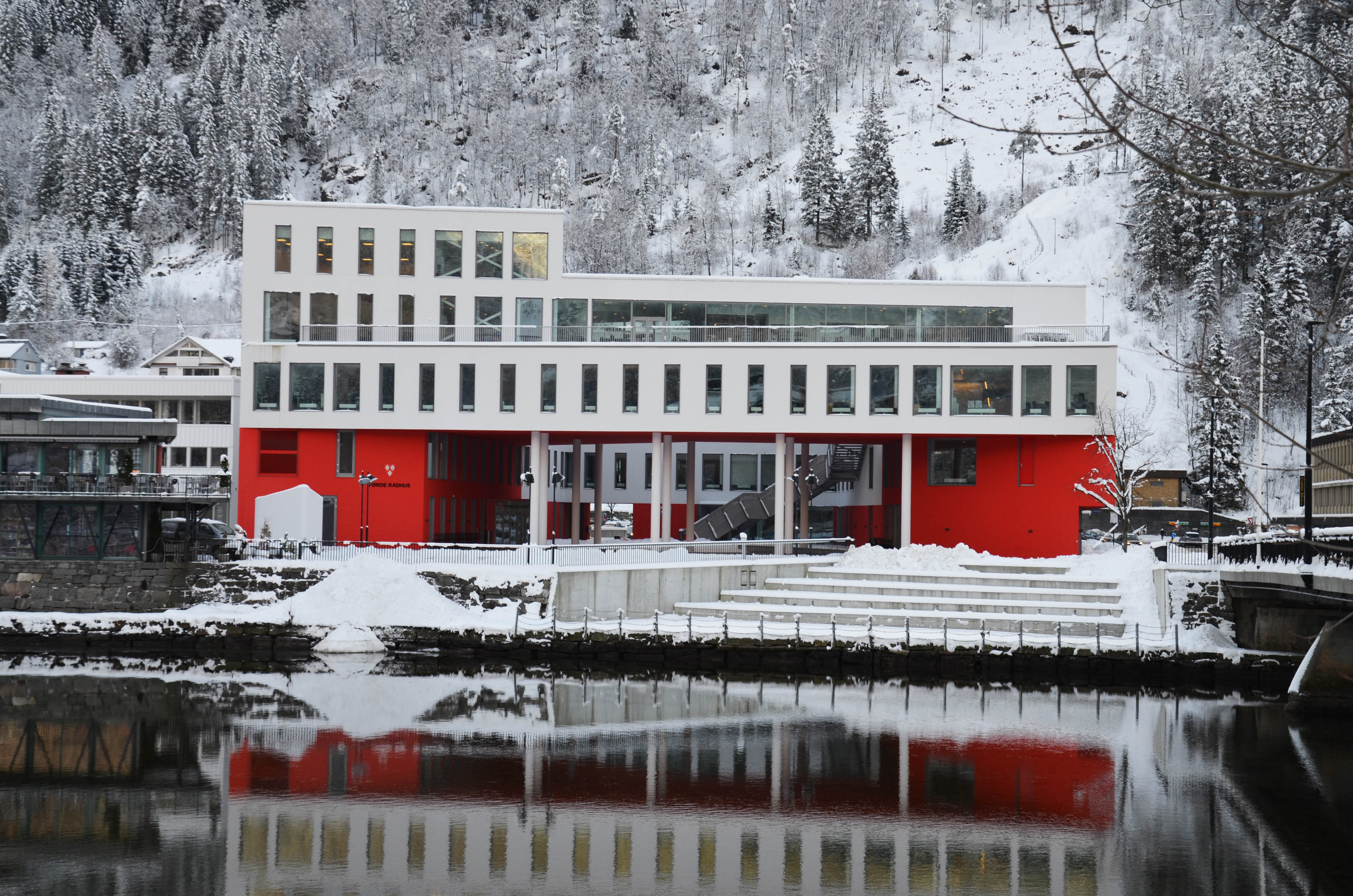 Førde rådhus vinter 2016.